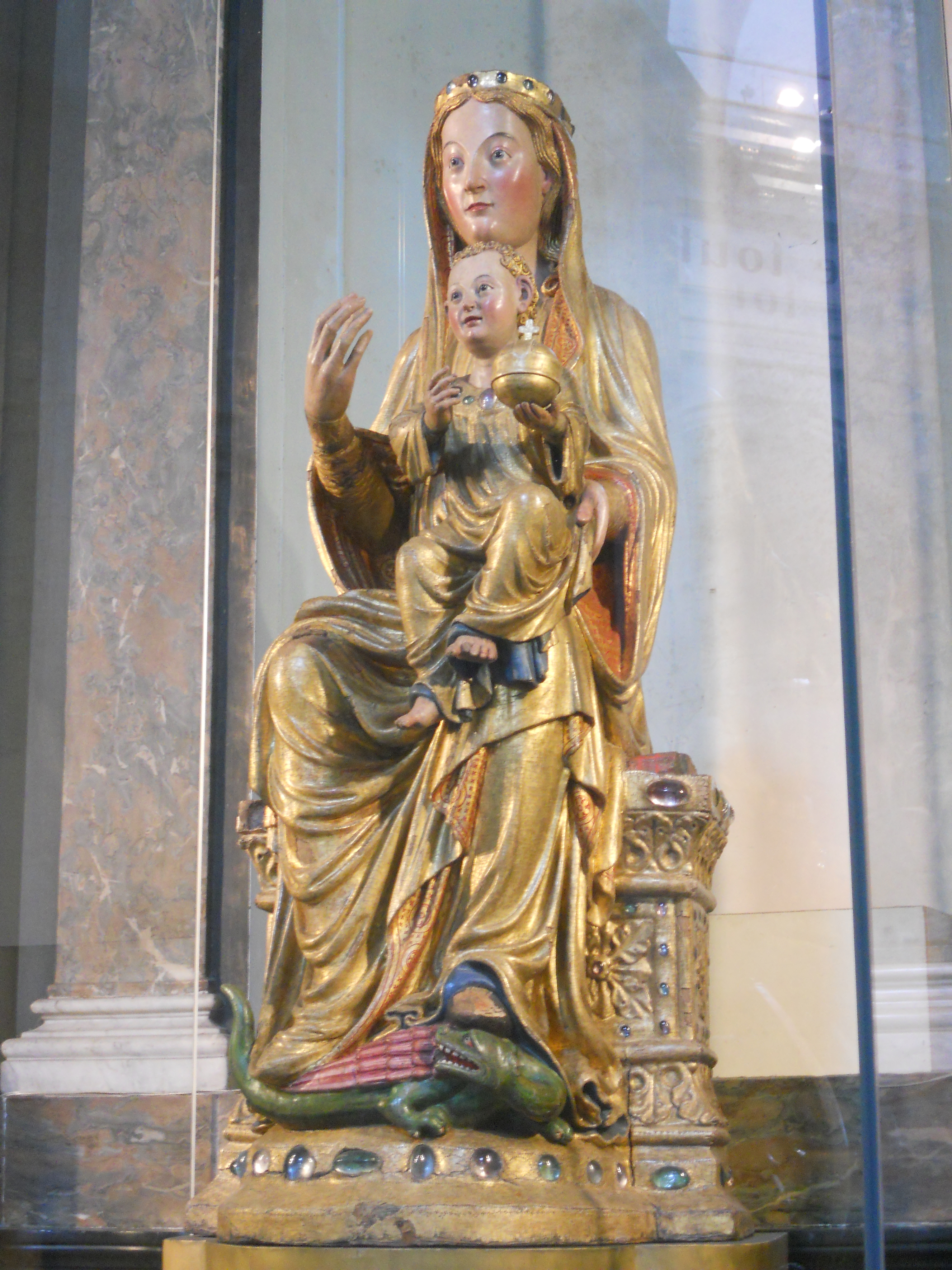 Sedes Sapientiae ( XIIIème siècle ) de l'église Saint-Jean l’évangéliste de Liège .